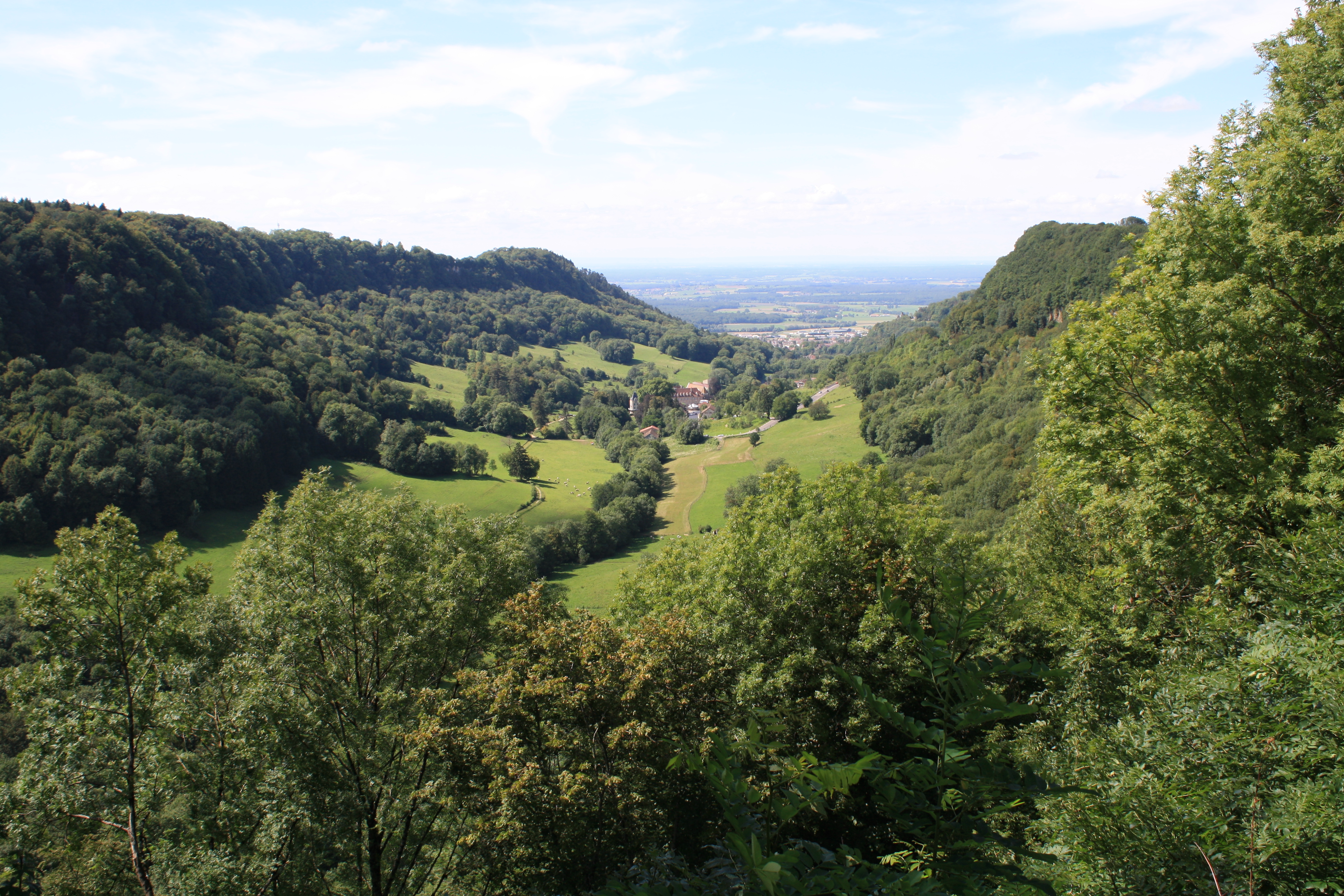 Reculée de Vaux-sur-Poligny depuis le belvédère des Monts-de-Vaux (Jura). Au creux de la reculée, l'ancien petit séminaire construit au XIXe siècle à l'emplacement d'un prieuré clunisien et, à l'arrière plan, la ville de Poligny.